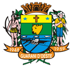 Brasão_do_Município_de_Guarani_d'Oeste